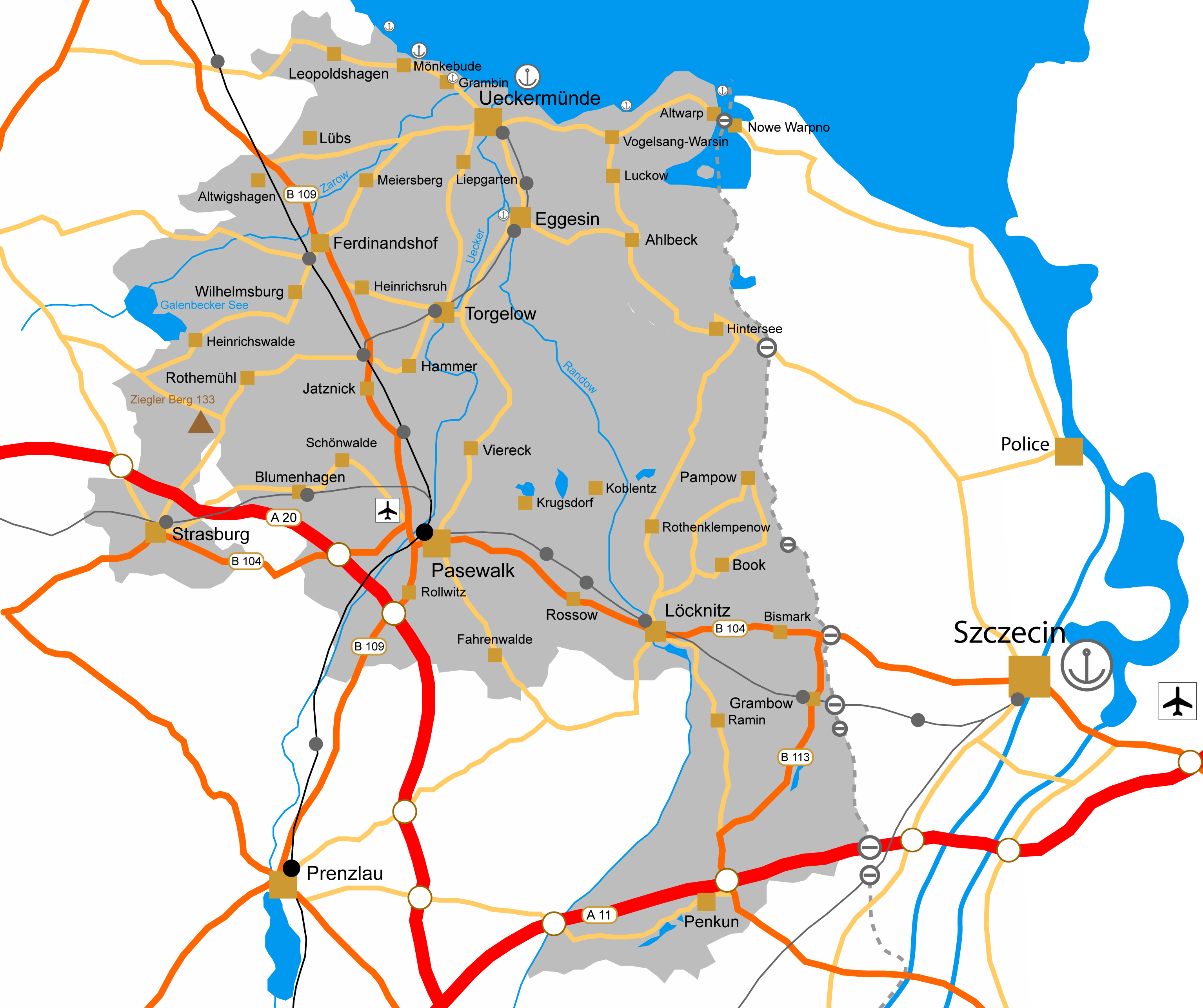 Infrastruktur im Landkreis Uecker-Randow